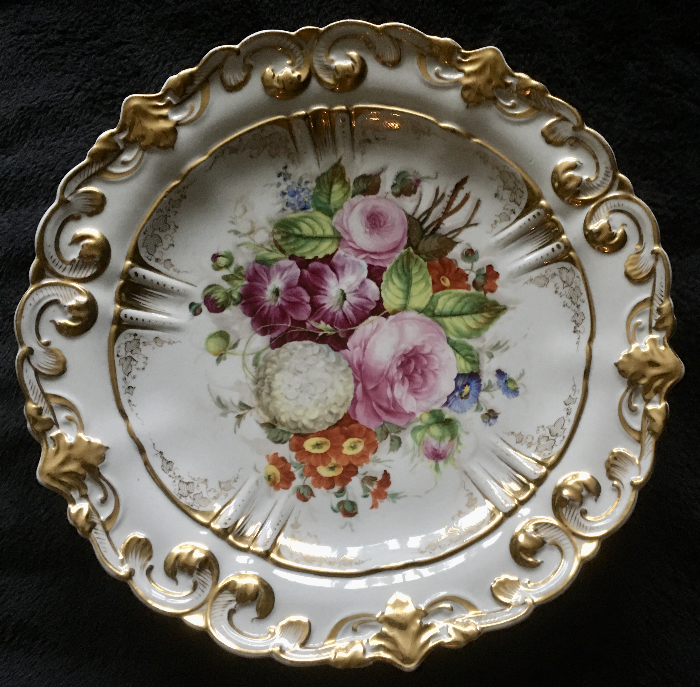 Tielsch Prunkteller , Marke 1848 - 1862, auf dem Kopf stehende Taube mit Lorbeerzweig im Schnabel, darunter TPM